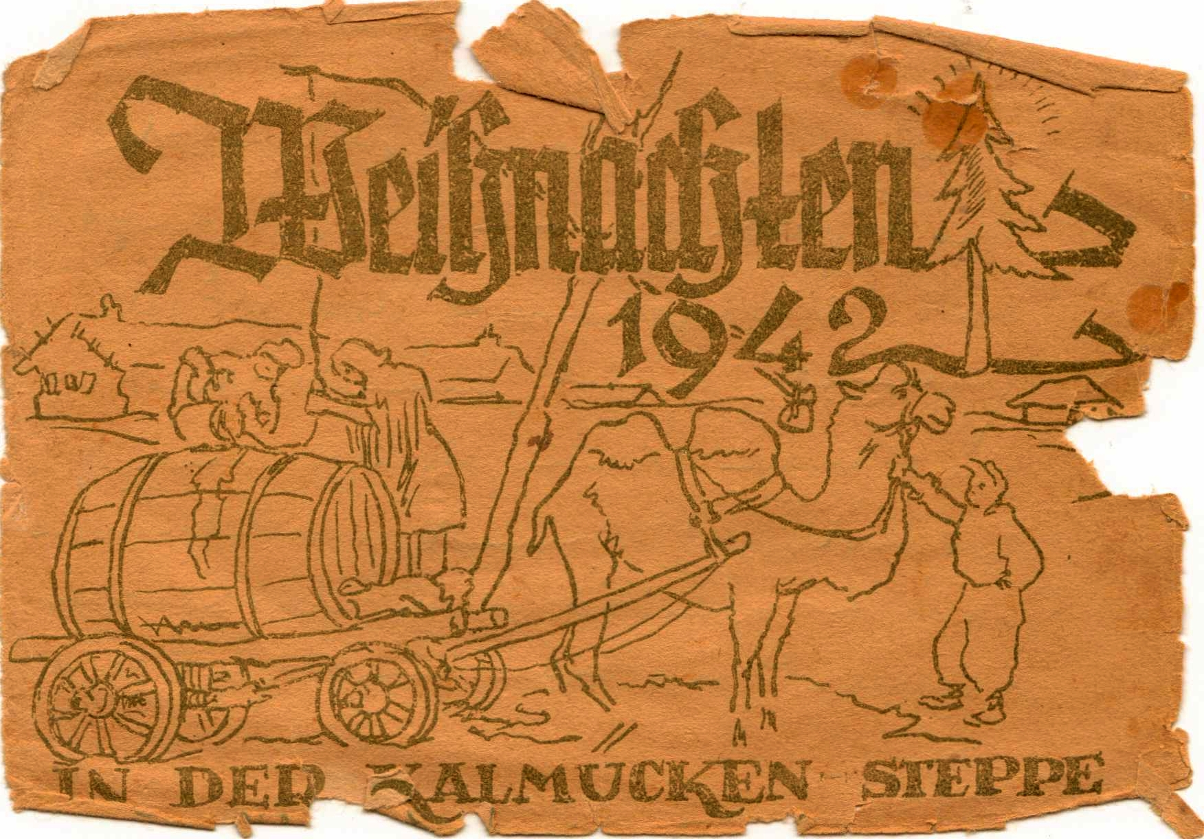 Umschlag eines Feldpostbriefes, Dezember 1942, "Kalmückensteppe" (Russland)